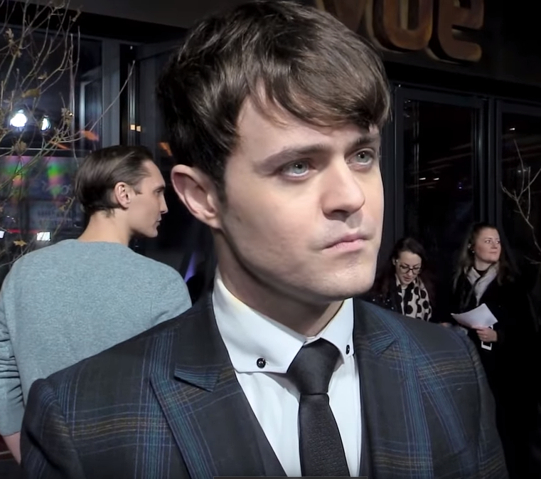 Joey Batey interviewé pour HeyUGuys, à l'avant-première de The Witcher.